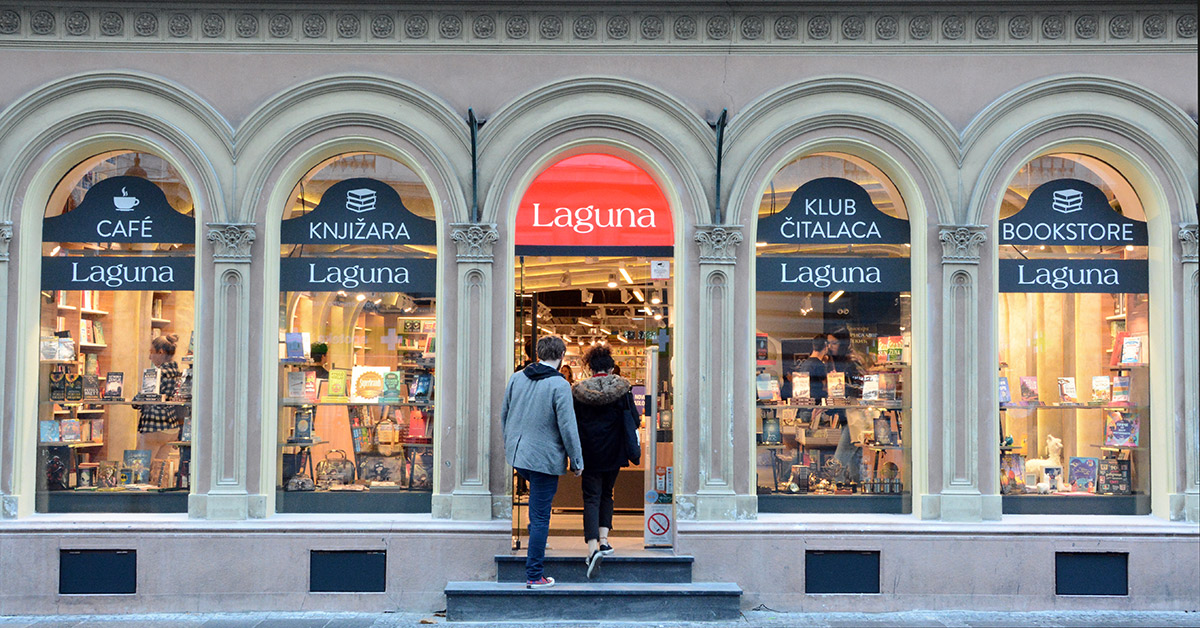 Srpski (latinica): Laguna